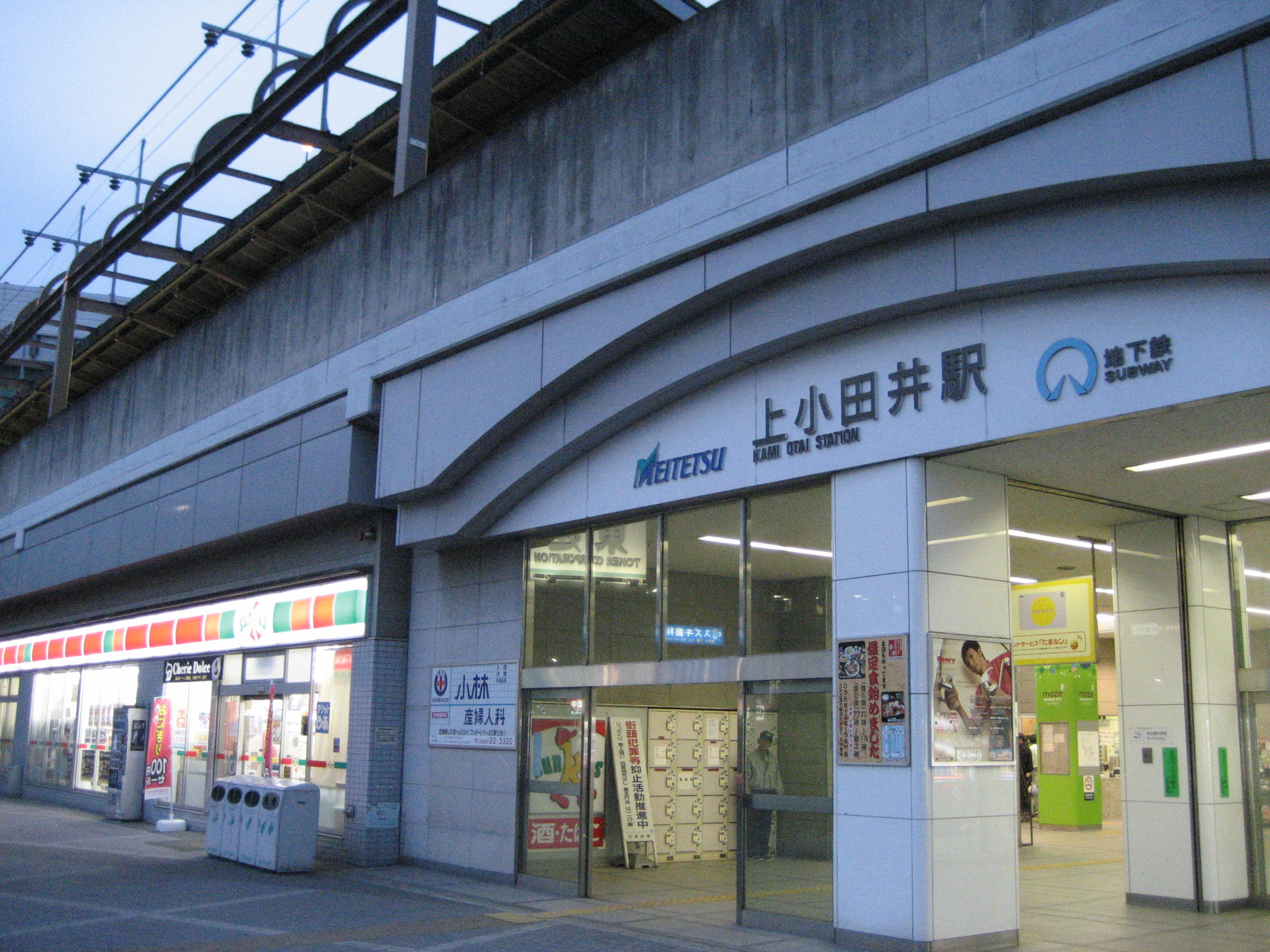 Subway/Meitetsu Kami-Otai